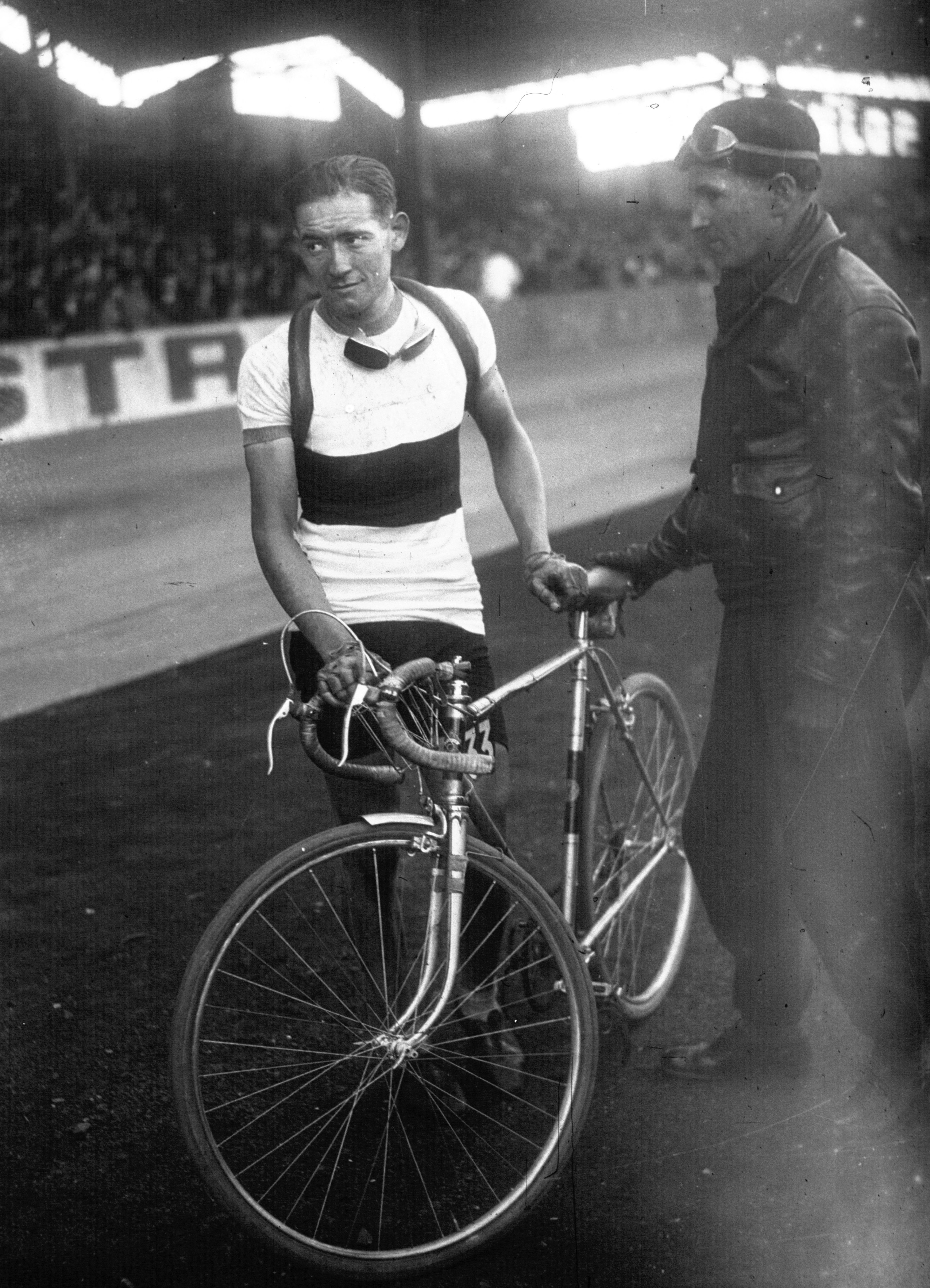 Buffalo : arrivée du Prix Wolber : René Vietto.